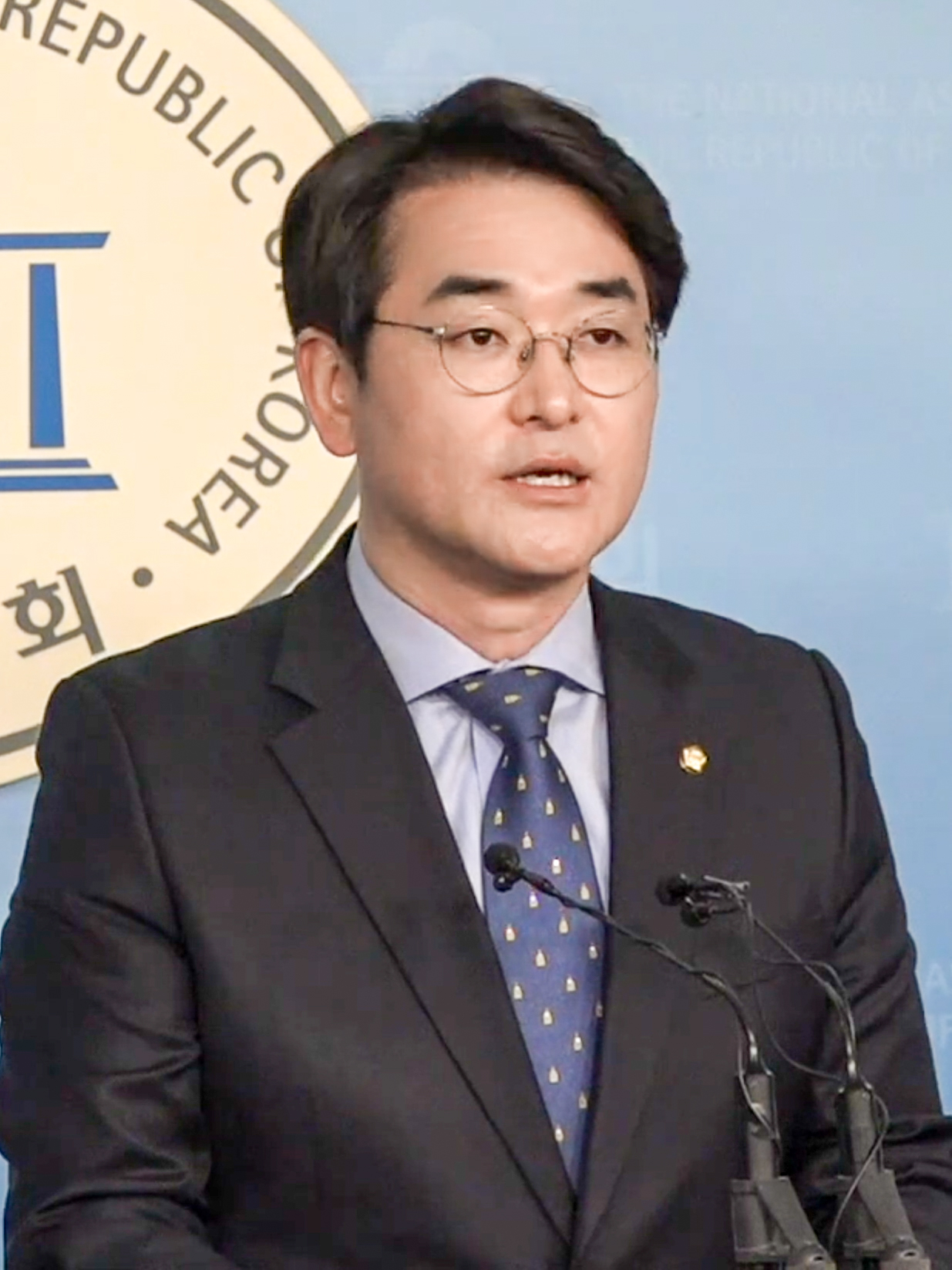 7일 오전 국회 정론관에서 더불어민주당 박용진 의원이 "이재용 부회장에 대한 대법원 판결은 검찰의 삼바 수사 이후에 이뤄져야 합니다!"라는 내용으로 기자회견을 했다. 박 의원은 이재용 삼성 부회장 뇌물사건에 대한 대법원 판결을 검찰의 삼성바이오로직스 회계사기 사건 수사 이후에 내려줄 것을 촉구했다. 검찰 수사로 드러난 삼성의 범죄행위들이 가리키는 것은 이재용 부회장의 경영권 승계 작업이 실제로 행해졌다는 것으로 삼바의 회계사기 사건은 단지 일개 회사에 국한된 사건이 아닌 삼성그룹 전반에 걸쳐 이루어진 범죄행위라고 말했다. 단순 회계사기 사건이 아닌 경영권 승계 작업을 위해 온갖 범죄행위를 총동원한 불법의 종합선물세트, 결정적인 ‘스모킹 건’이라며 이를 철저히 수사해 다시는 개인과 총수 일가의 이익을 위해 기업과 투자자 이익이 희생되고 국민경제와 시장질서에 피해를 입히는 일이 벌어지지 않도록 검찰과 재판부가 법의 정의를 바로 세워줘야 한다고 강조했다. ©뉴스엔뷰